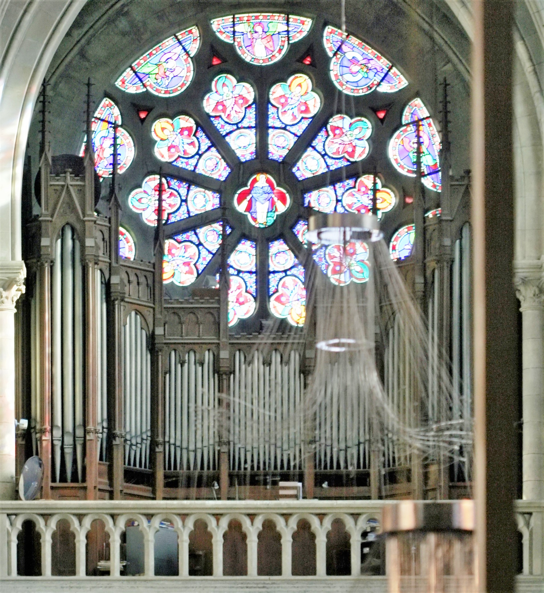 Grand-orgue Cavaillé-Coll (1860 - Opus 158/120, II+P/22).